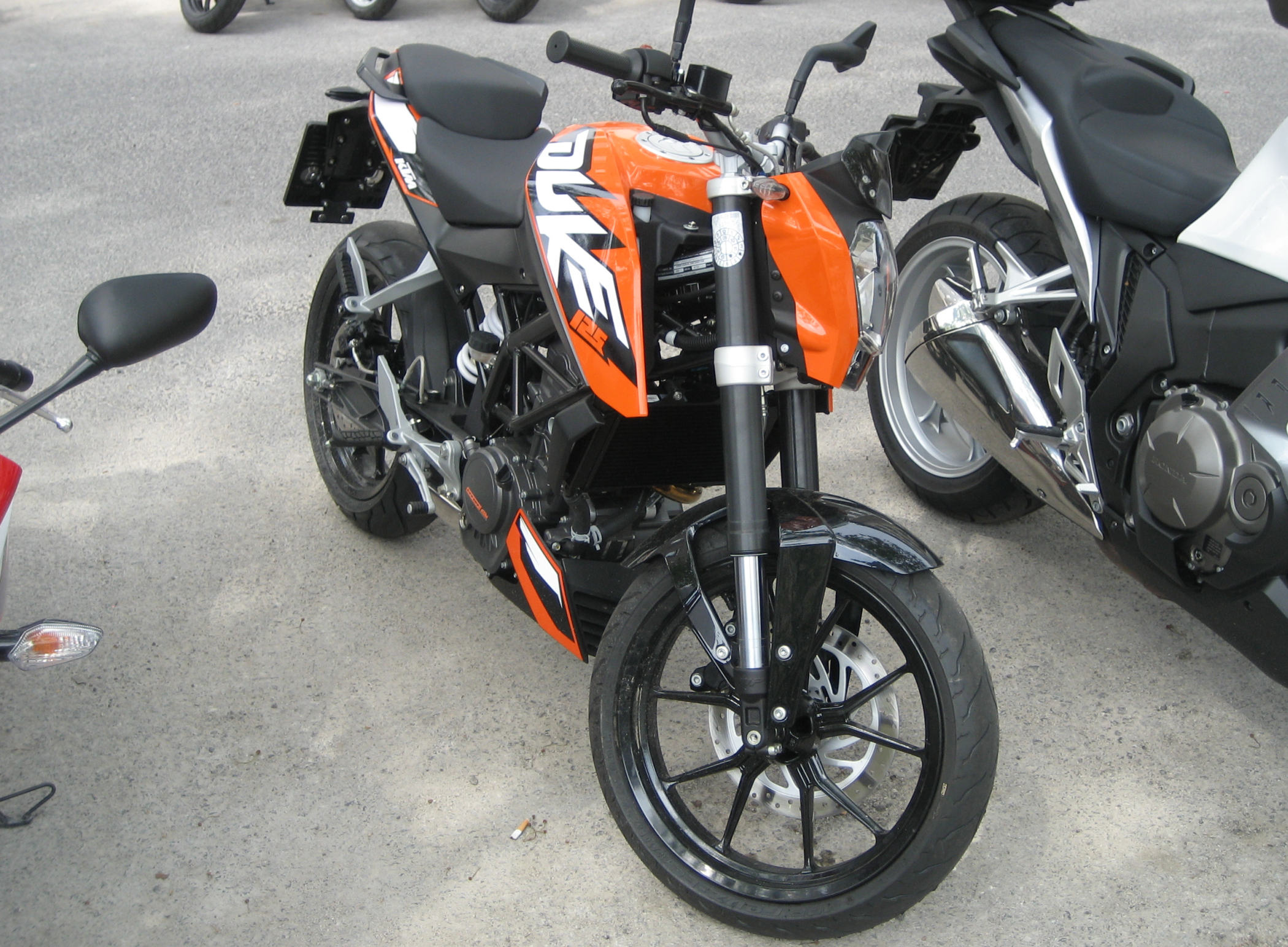 eine KTM 125 Duke